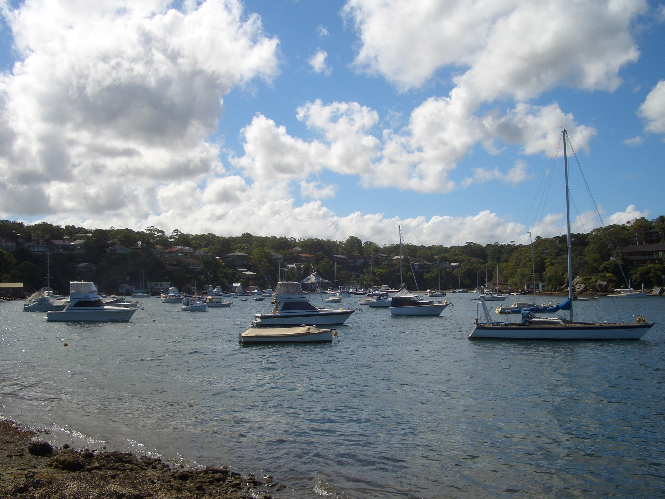 Dolans Bay